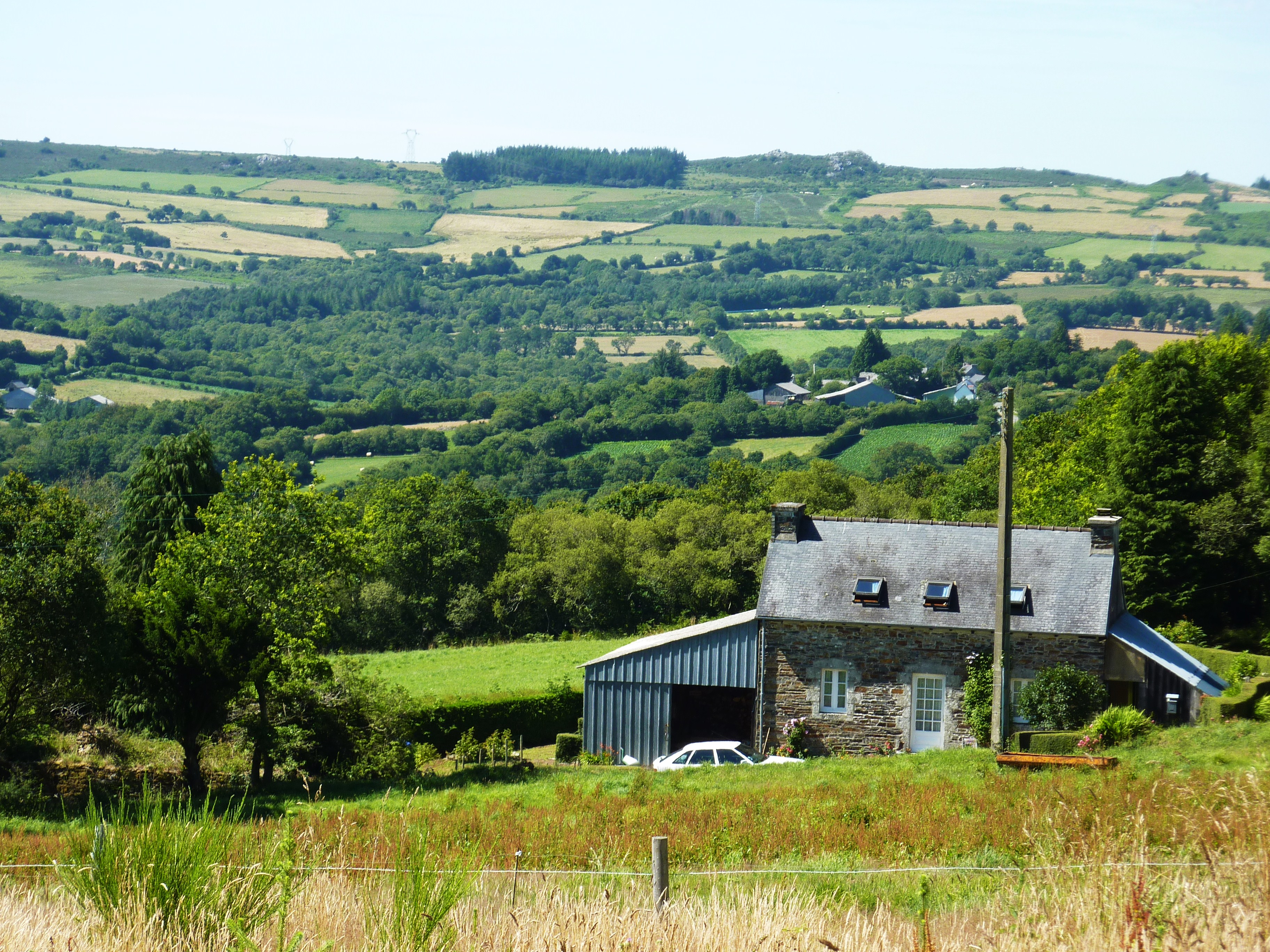 Saint-Rivoal: Goas-al-ludu dans un paysage vallonné et bocager